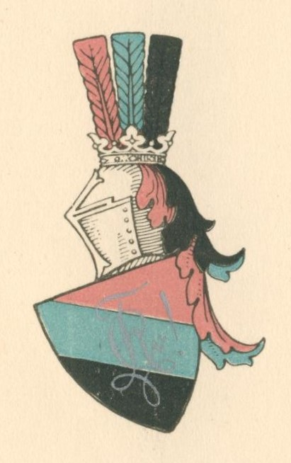 Wappen der Wehrschaft Frisia München